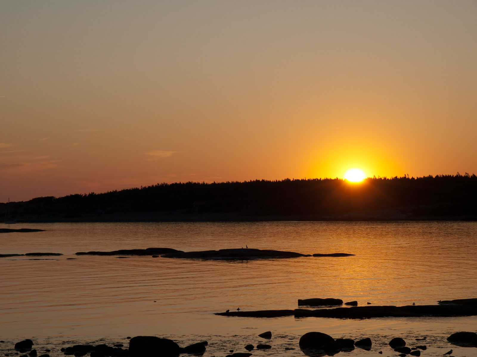 Sunset in Hvaler, Norway